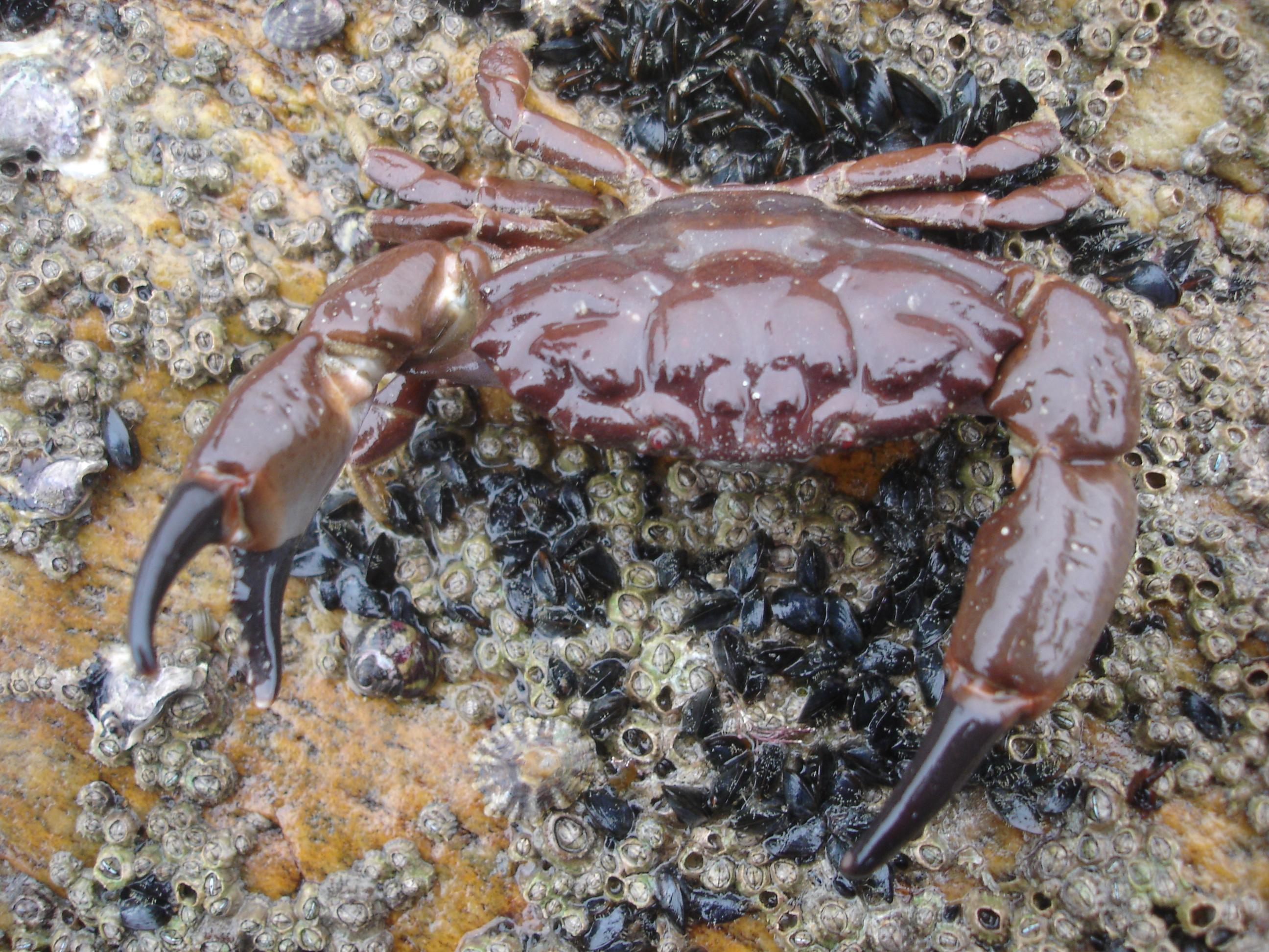 Crabe de fer (Xantho incisus) dans le nord-ouest de l'Atlantique